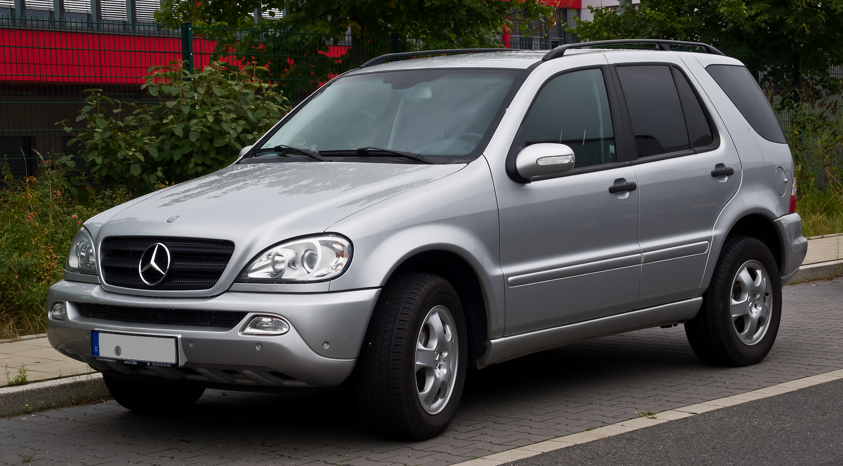 Mercedes-Benz ML 270 CDI (W 163, Facelift)